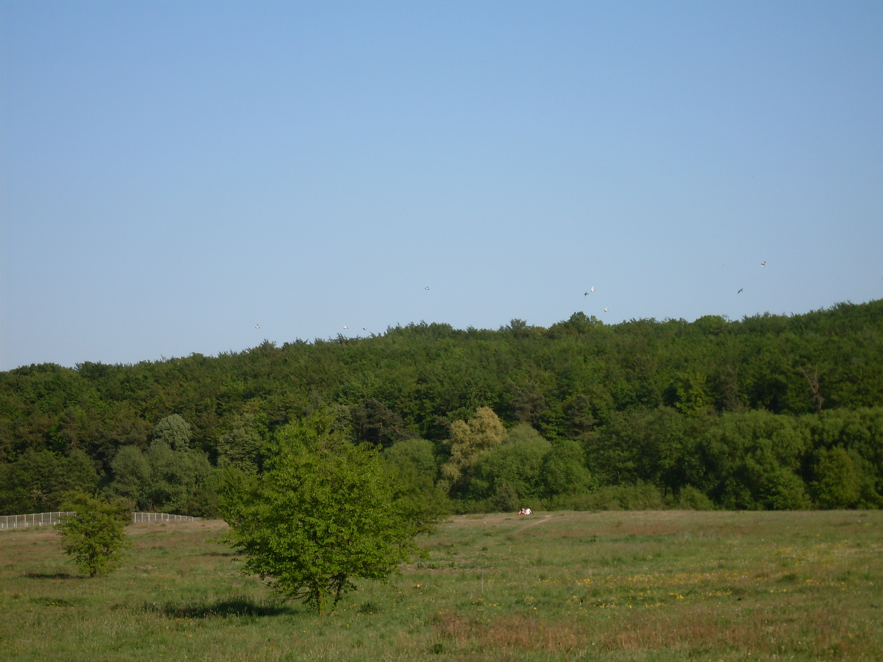 Wzgórza Warszewskie, widok z Równiny Polickiej, Police